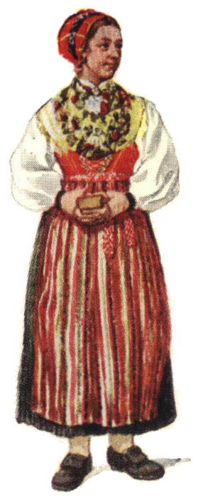 Folkdräkt från Leksands socken (Dalarna)